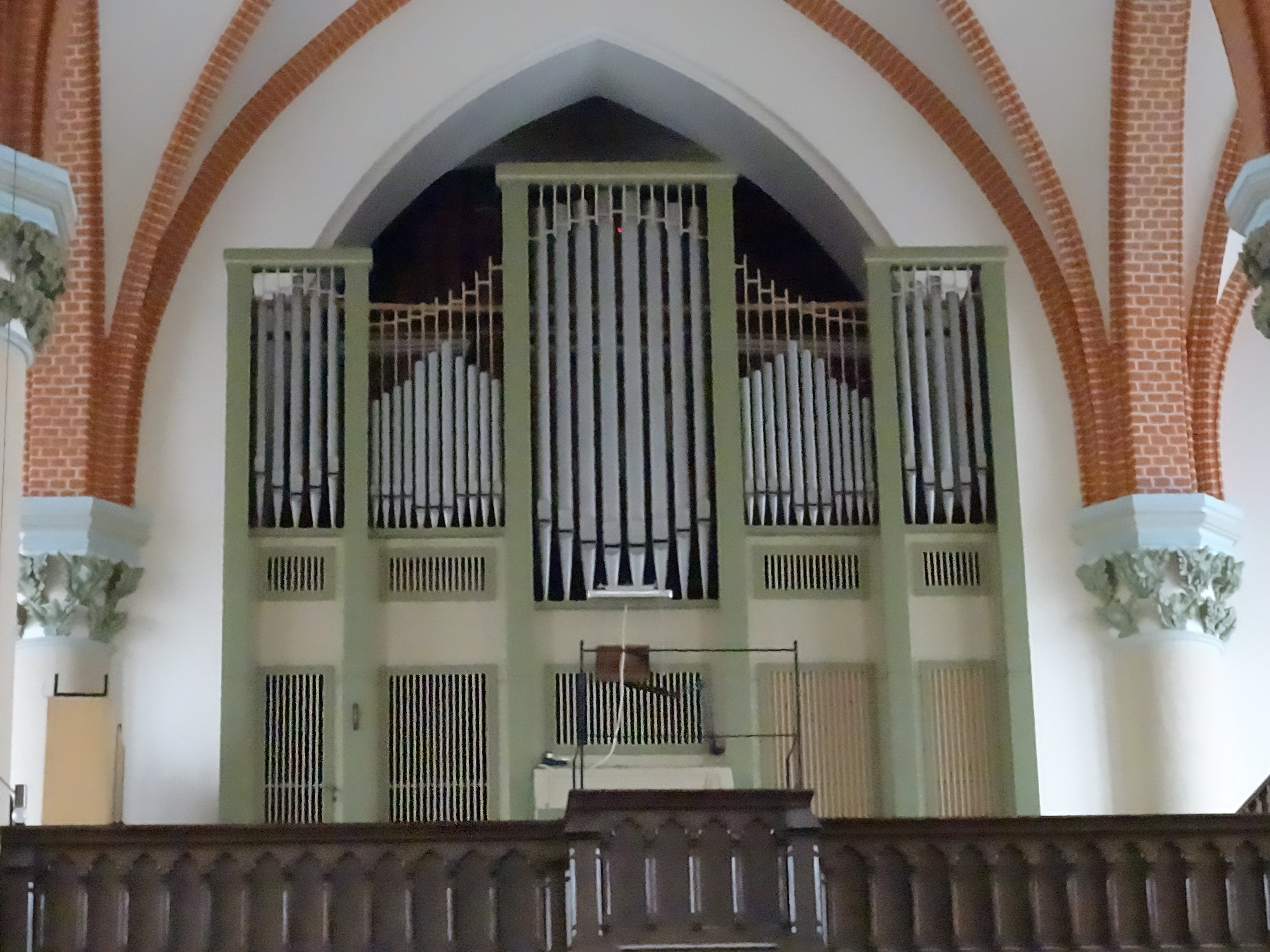 Die ursprüngliche Orgel der Ambrosiuskirche wurde 1880 von Wilhelm Sauer erbaut. 1927 baute Orgelbau Rühlmann die Pneumatik um. Im Jahr 1959 restaurierte Eule Orgelbau die Orgel und nahm weitere Änderungen vor.